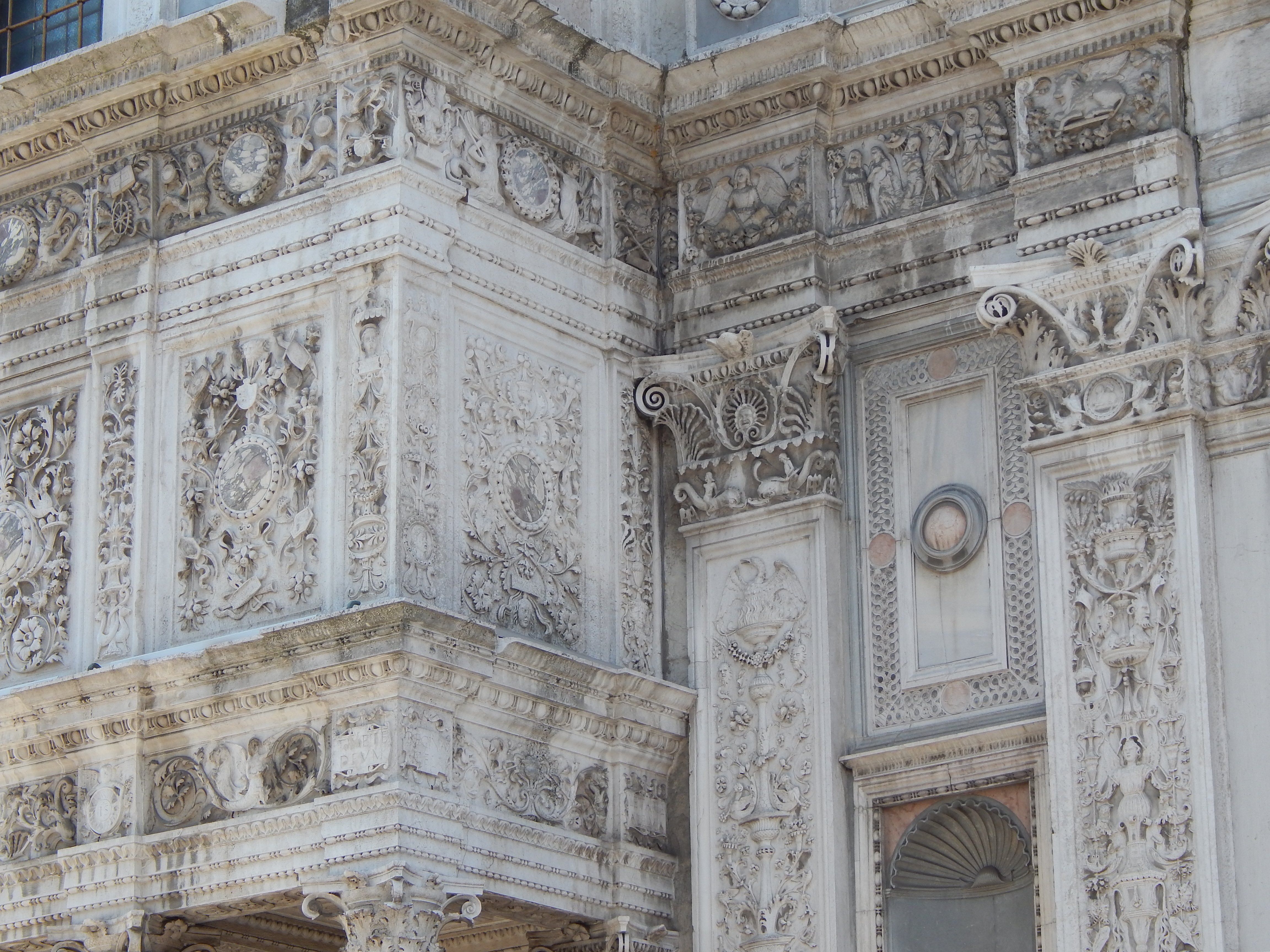 Santa Maria dei Miracoli (Brescia) - Dettaglio della facciata